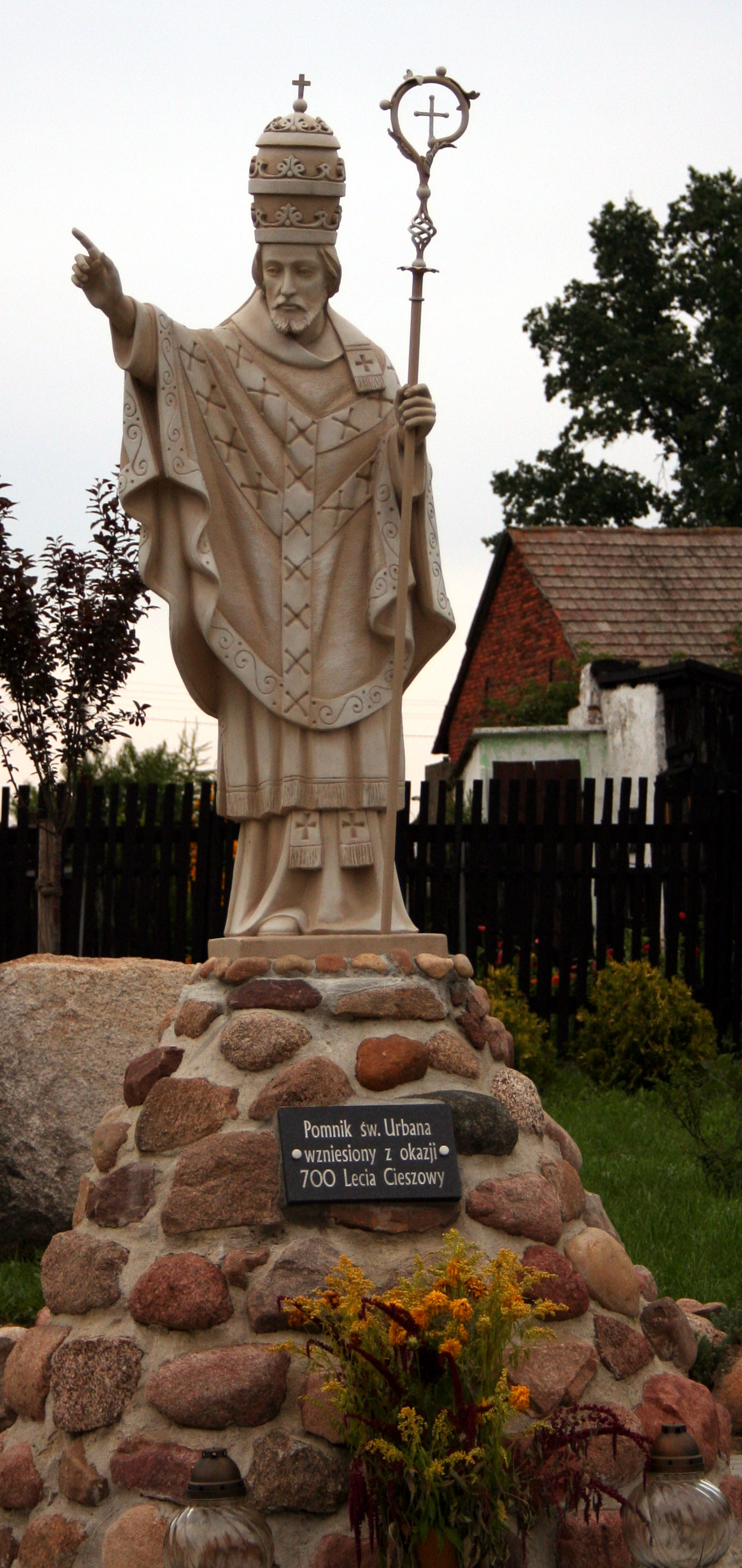 Pomnik świętego Urbana w Cieszowej.